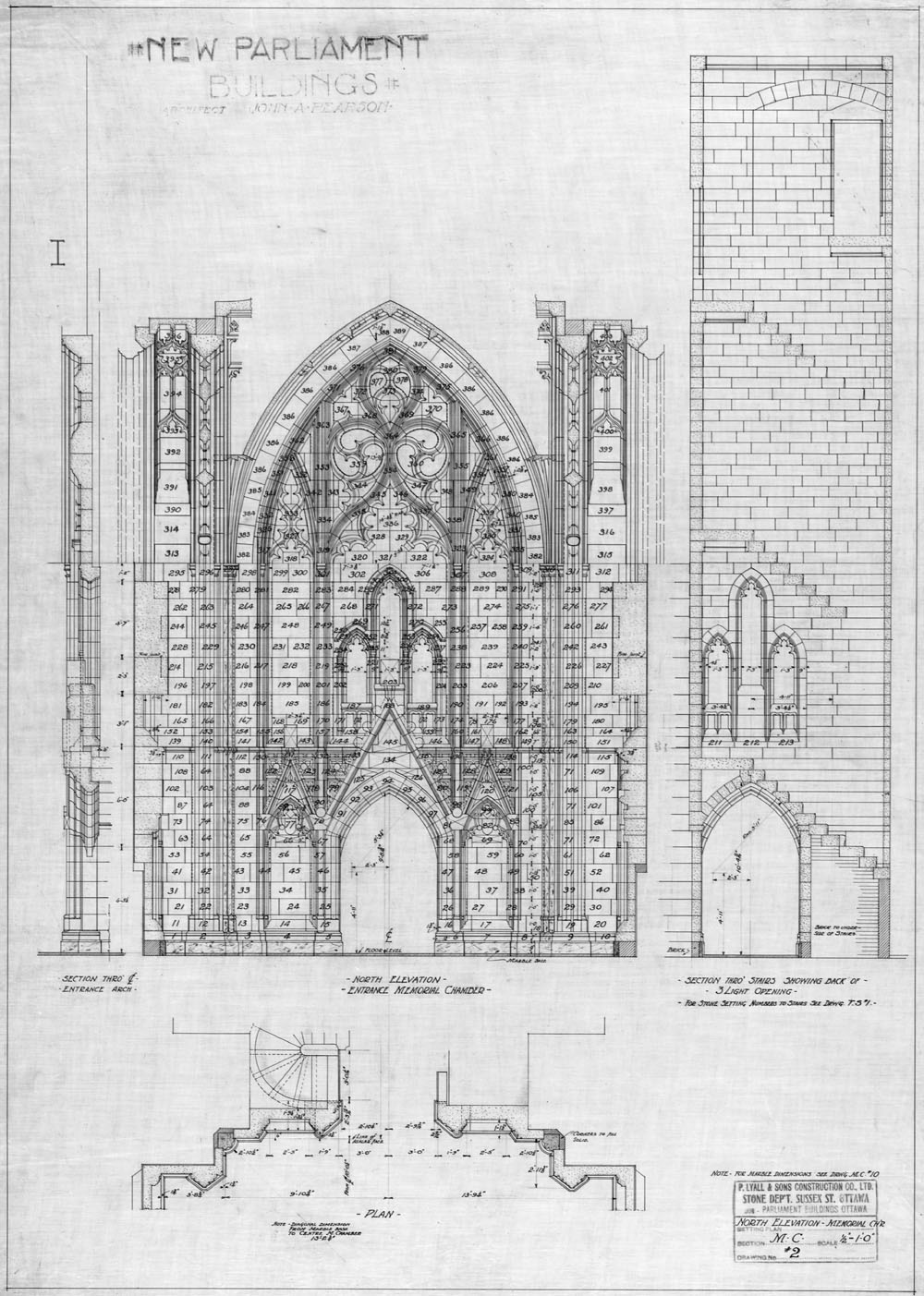 Chapelle du Souvenirs